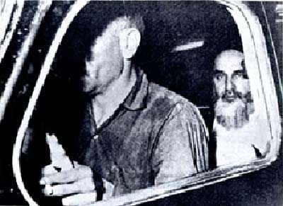 خمینی در خودروی کرایه‌ای در حال عزیمت به مجلس درس (این عکس مدتها به اشتباه به دستگیری توسط ساواک نسبت داده می‌شد)